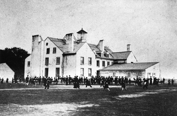 L'ancienne résidence des gouverneurs de Trois-Rivières convertie temporairement en collège. Le Collège de Trois-Rivières occupait autrefois l'édifice des Casernes.